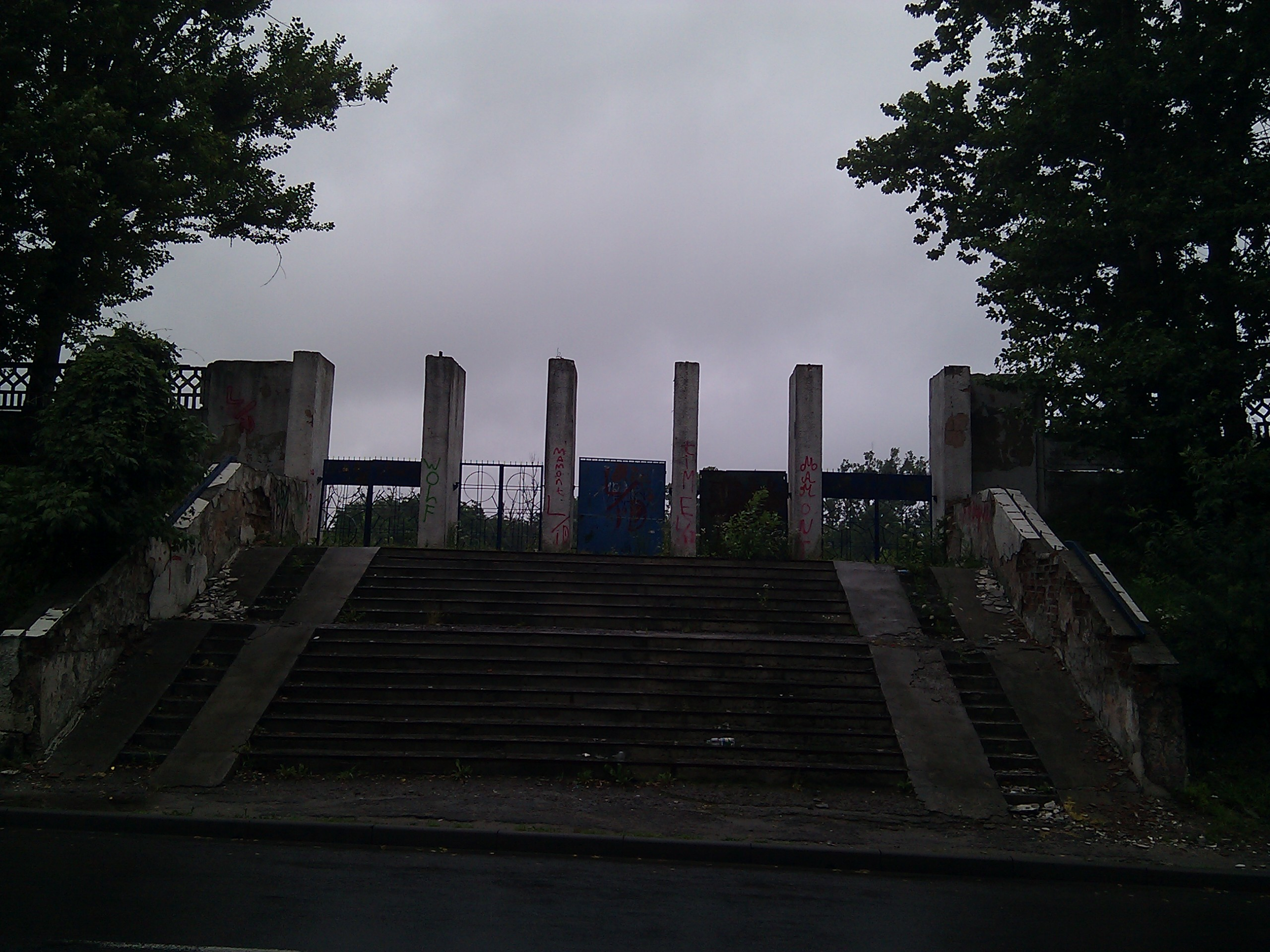 Ostatni stadion Hasmonei koło Cmentarza żydowskiego